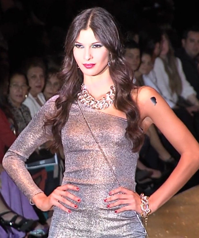 Toya Montoya, modelo colombiana en desfile de Studio F en Cali ExpoShow 2011